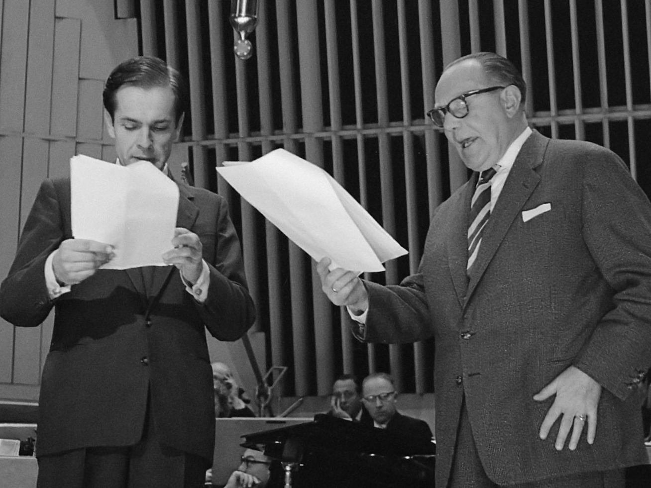 Radio-uitzending "Uit ben je" , links Paul van de Lek rechts Jan van Ees 3 november 1959